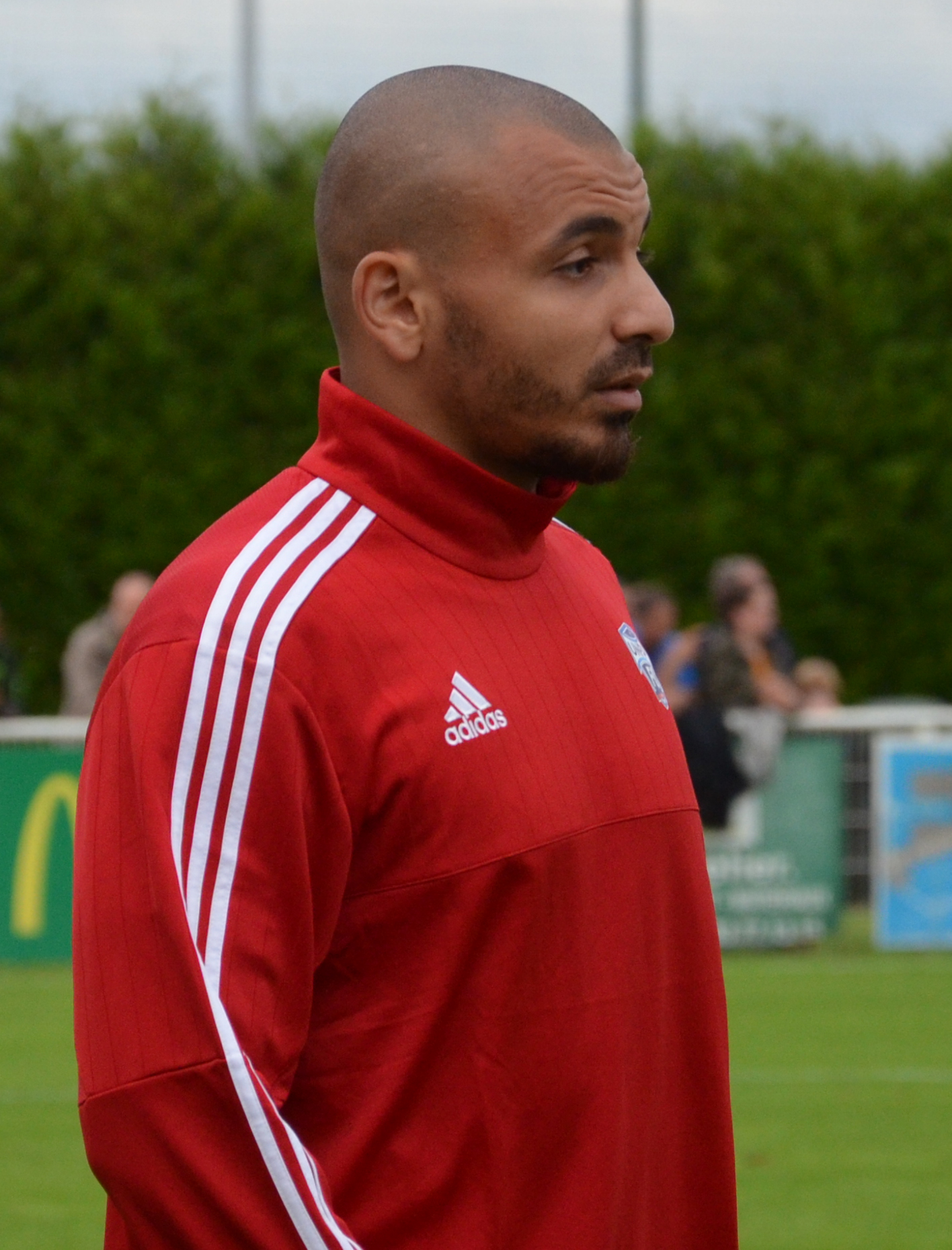 Photographie prise lors du match opposant le SM Caen à l'UNFP en match amical au stade Louis-Villemer de Saint-Lô le 30 juillet 2016. Ici, Brahim Ferradj.